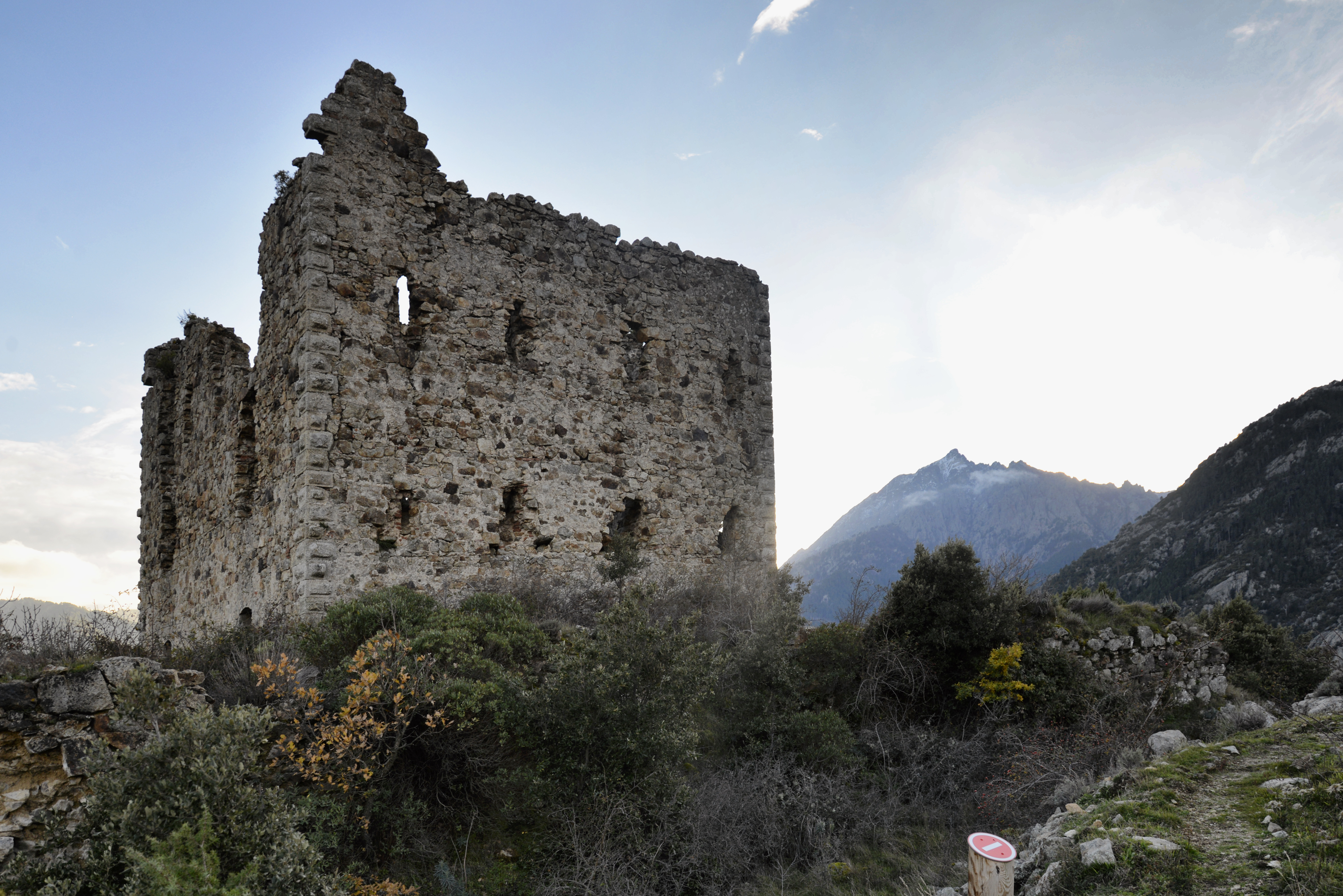 Vivario (Centre Corse) - Les ruines du fortin de Pasciolo. À l'arrière-plan, le Monte d'Oro.